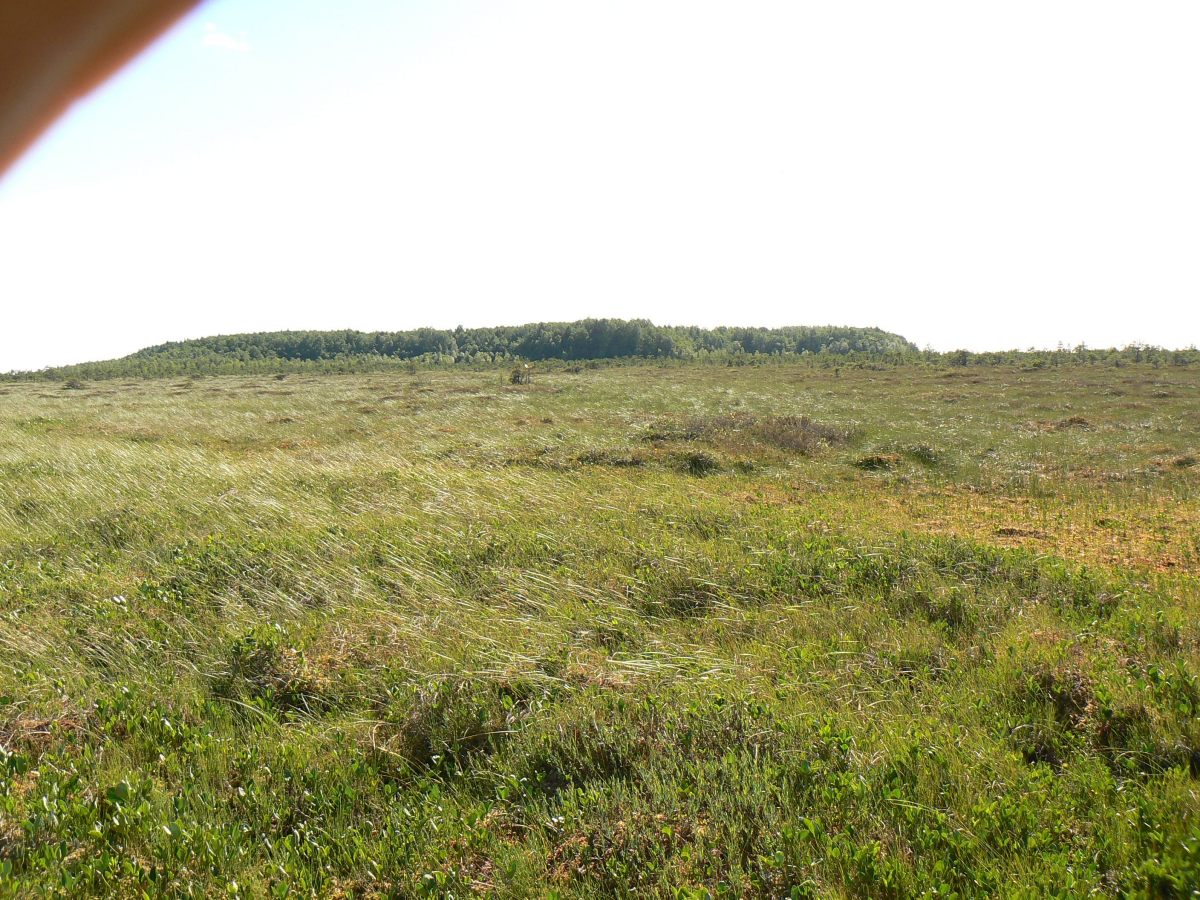 Virussaare rabasaar